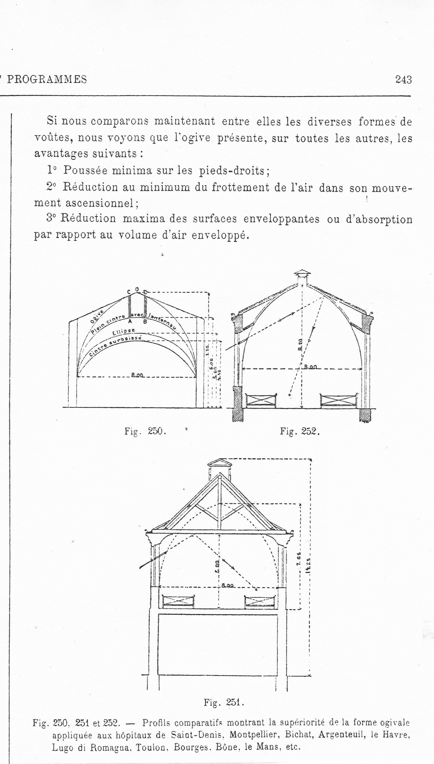 Profils comparatifs montrant la supériorité de la forme ogivale appliquée aux hôpitaux de Saint Denis, Montpellier, Bichat, Argenteuil, etc.